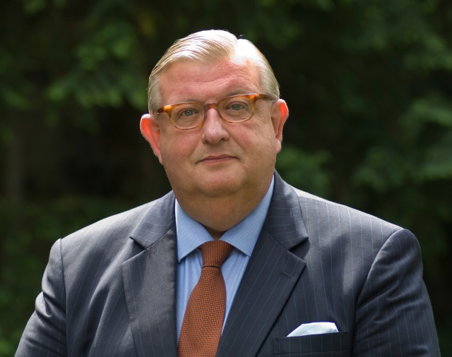 Nederlands politicus en partijvoorzitter van de VVD.